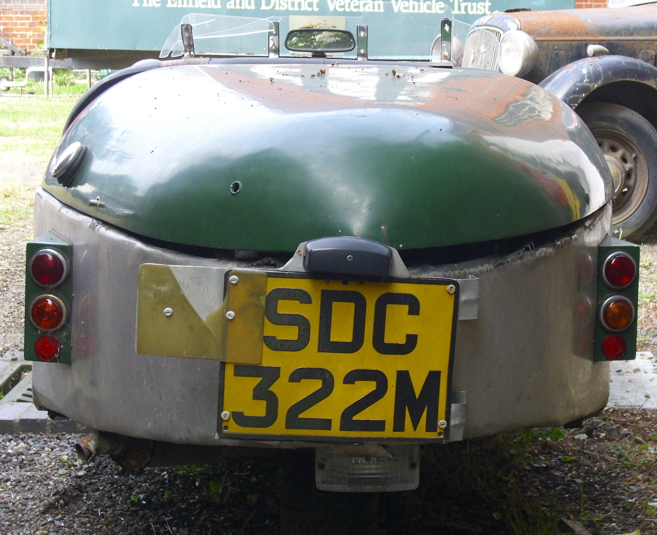 Skip